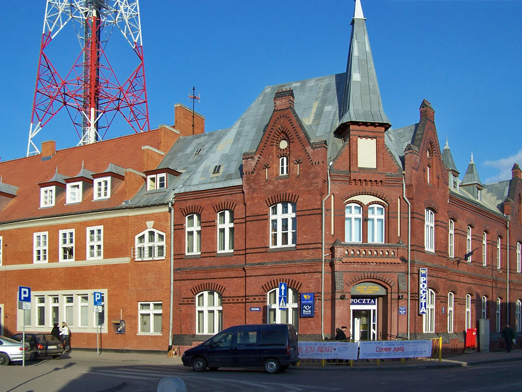 Goleniów, ul. Konstytucji 3-go Maja 17 - poczta